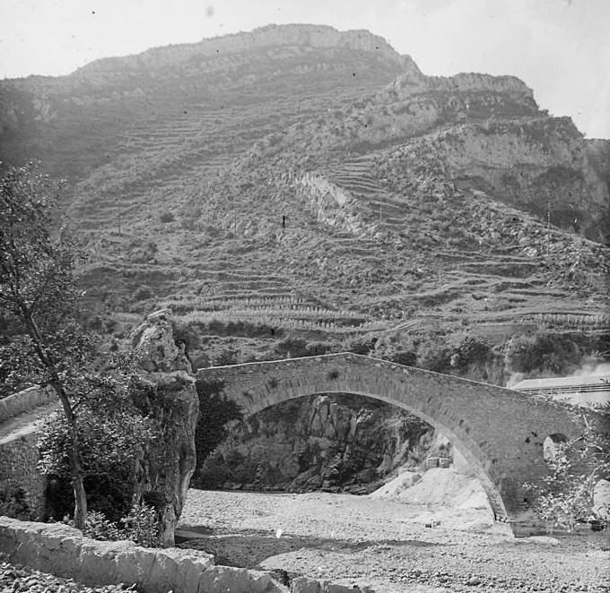 El pont fa de partió entre els municipis de Campdevànol i Ribes de Freser